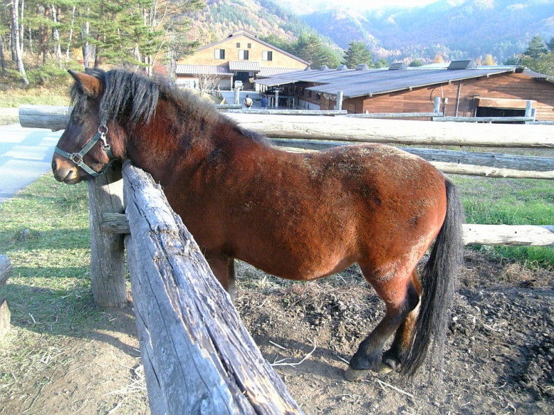 木曽駒